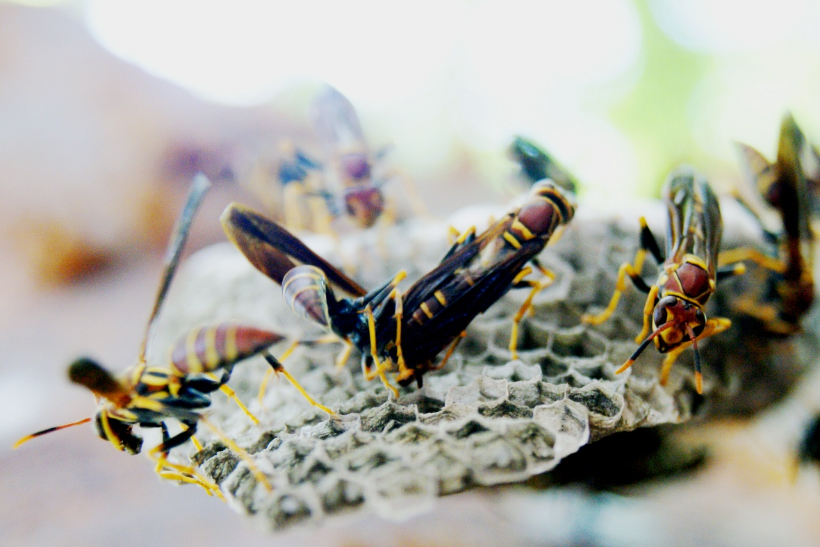 Avispas en una bursera Isla De Enmedio, Ver.